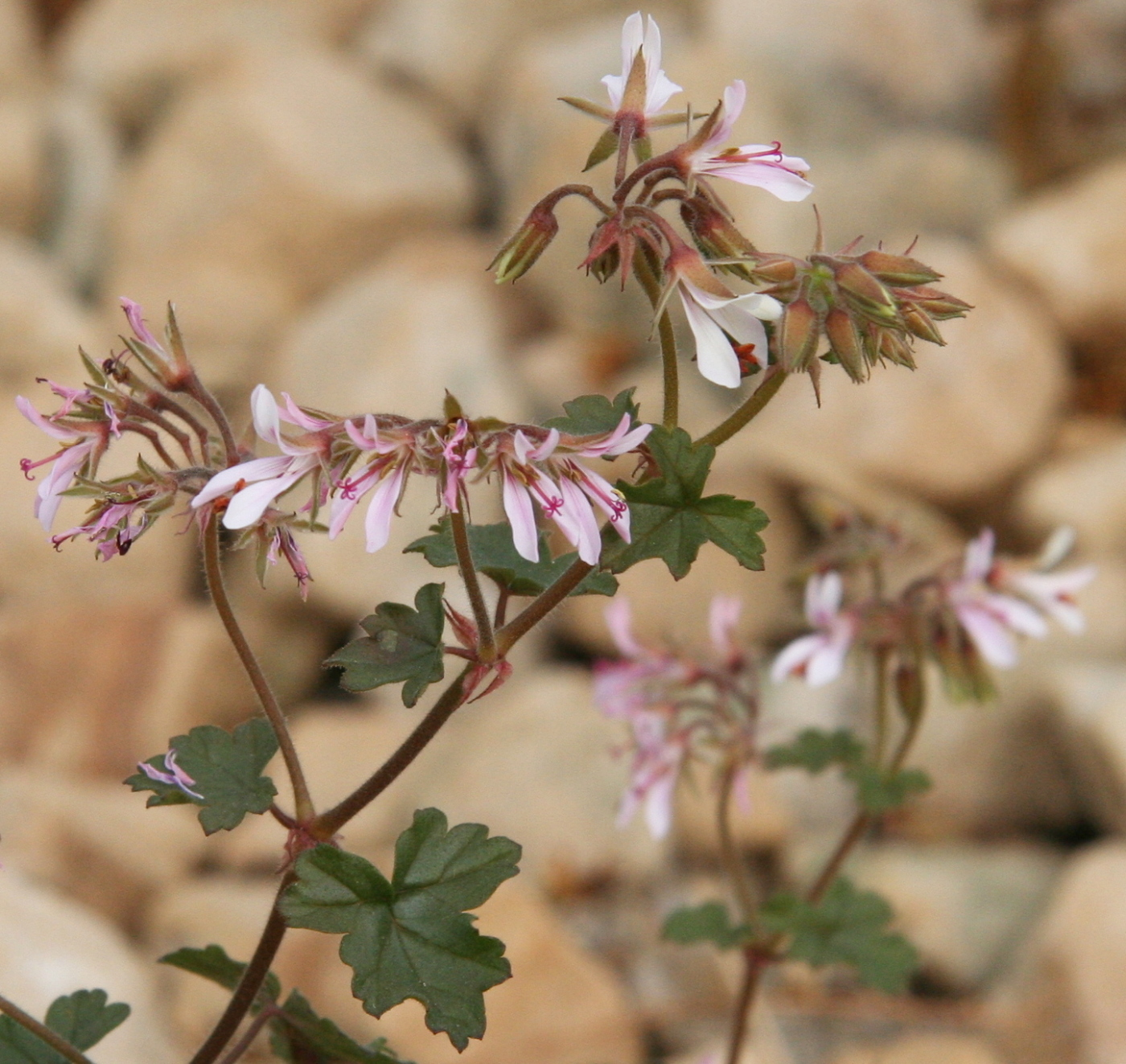 Pelargonium glechomoides im Botanischen Garten Dresden